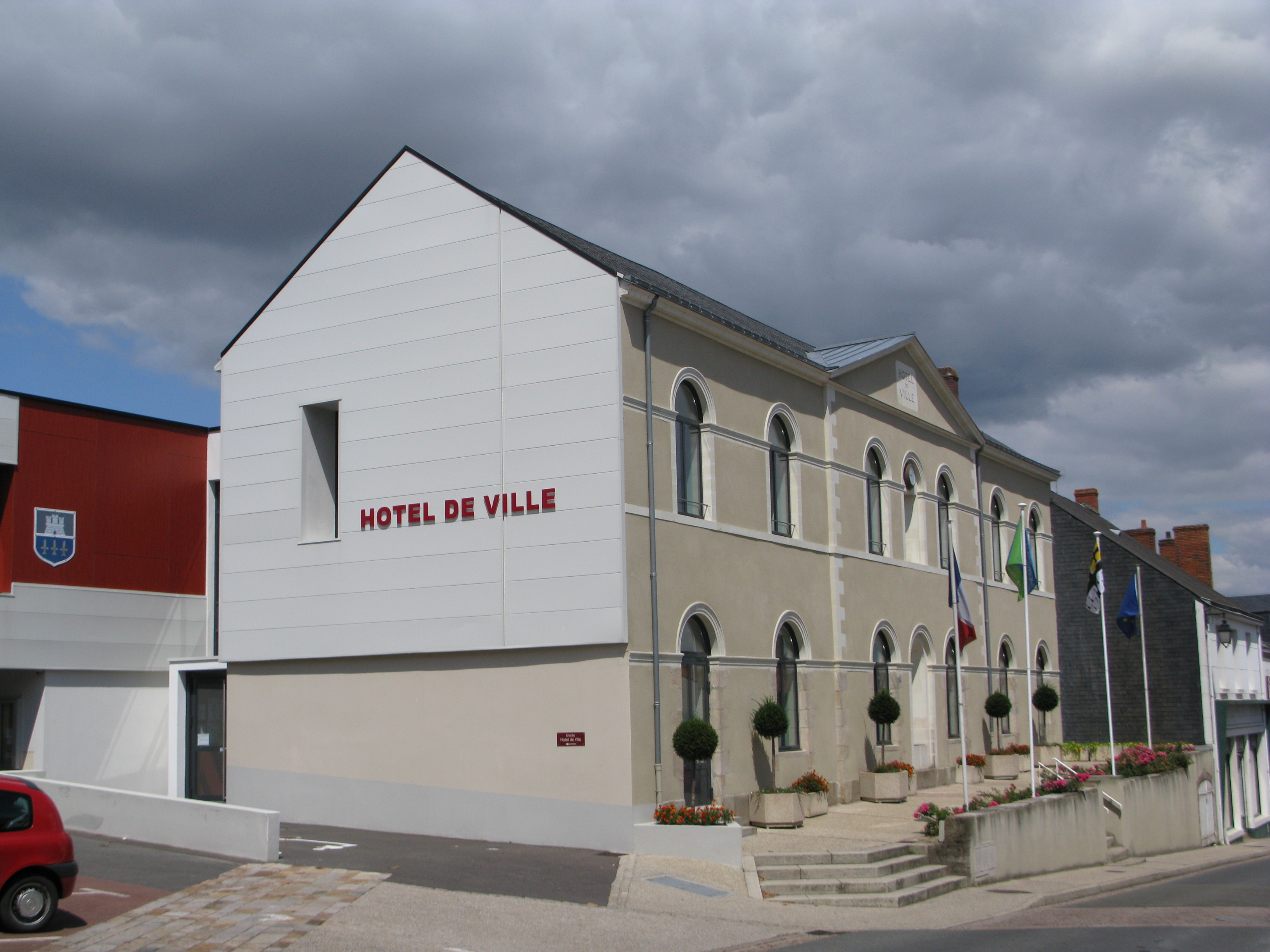 Hôtel de ville de Legé